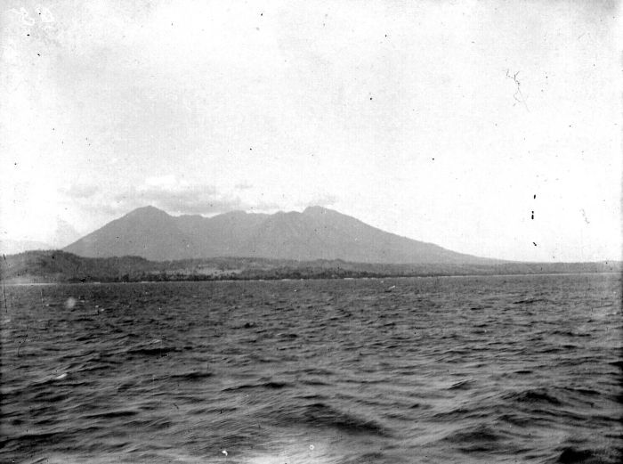 Negatief. De vulkaan Beloeran aan de Oostkust van Java, vanuit zee